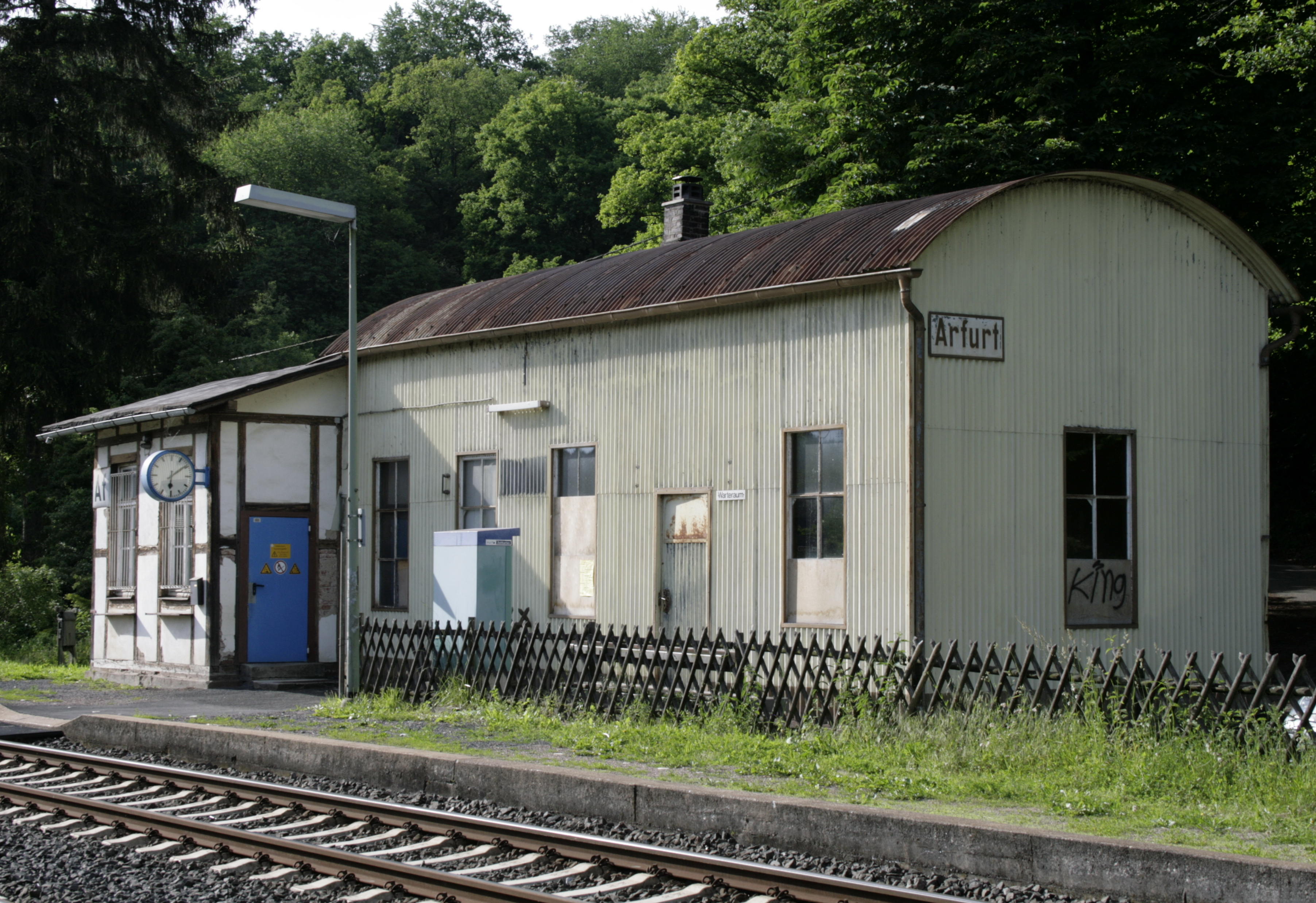 Ehemalige Bahnhof in Arfurt, Deutschland